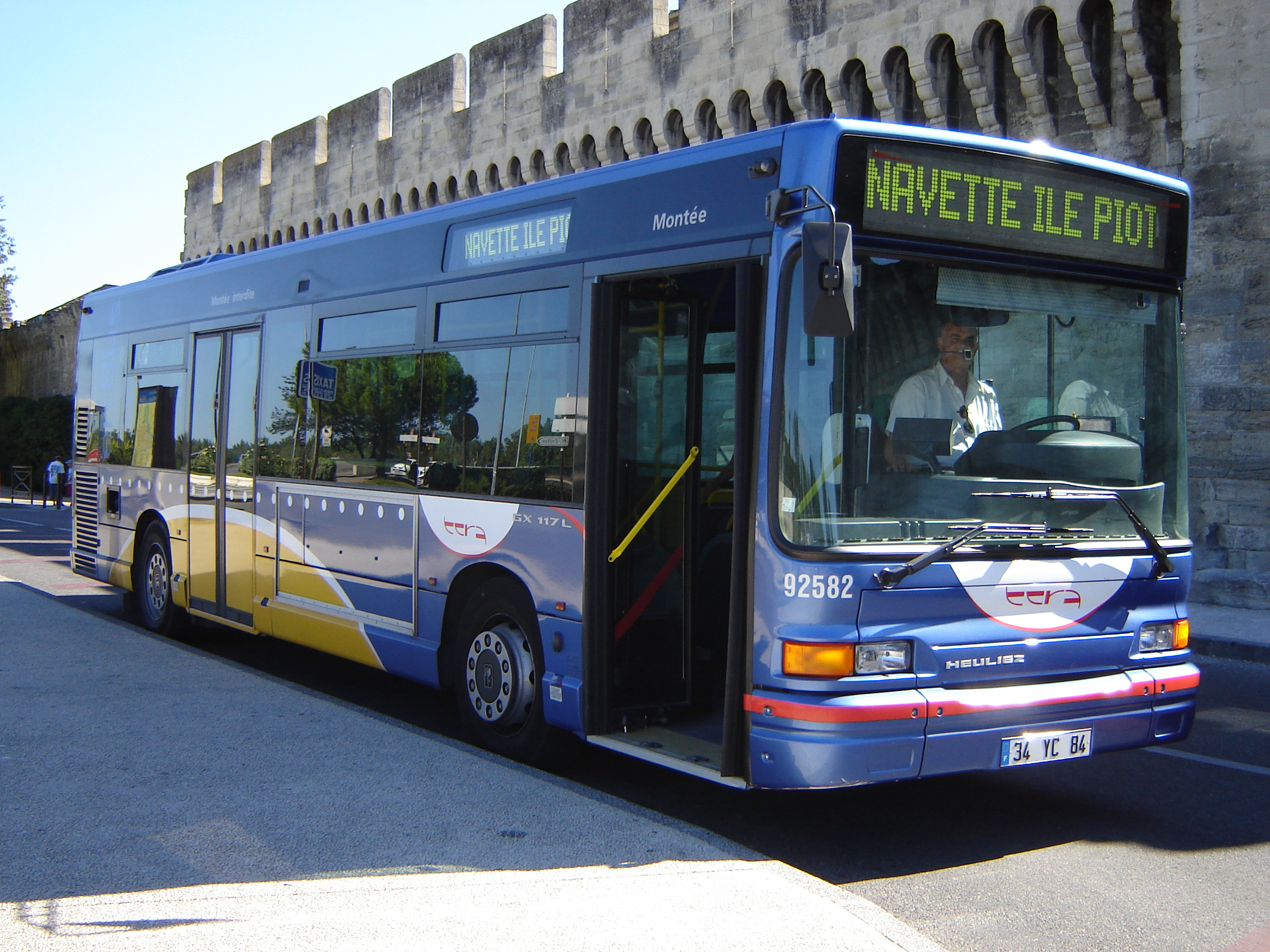 Un Heuliez GX 117 L du réseau TCRA d'Avignon